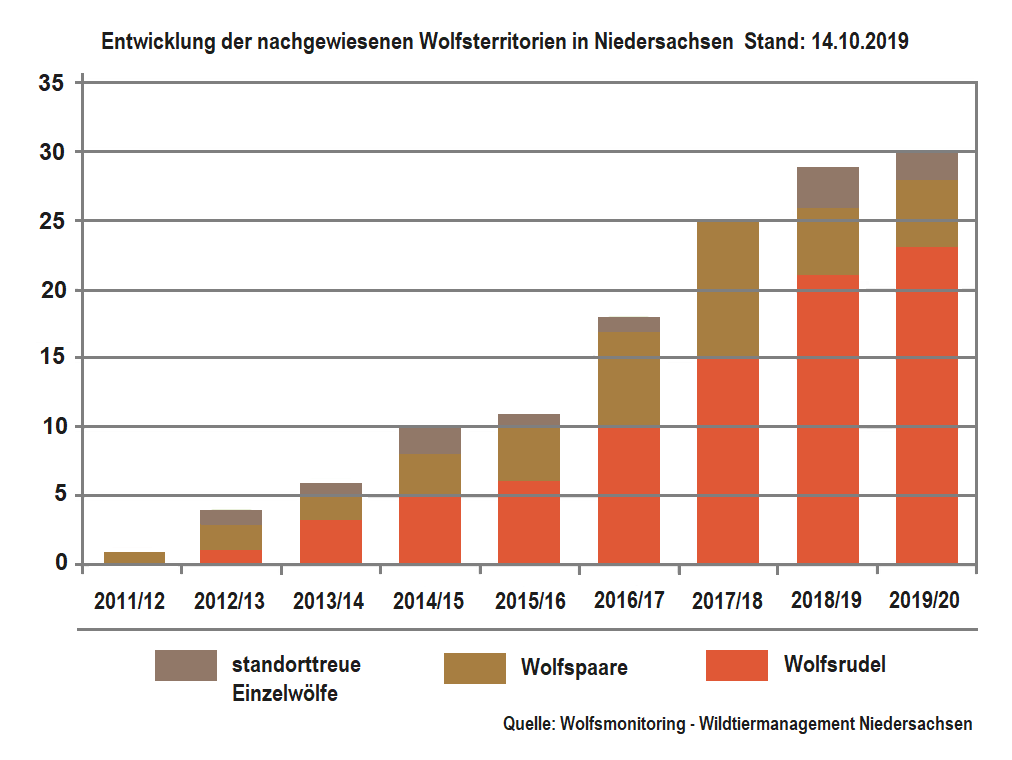 Entwicklung der nachgewiesenen Wolfsterritorien in Niedersachsen, Stand 4. Oktober 2019